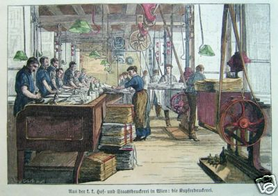 "Aus der k. k. Hof- und Staatsdruckerei in Wien: die Kupferdruckerei", Holzstich, Handkoloriert